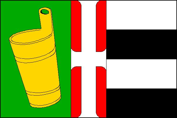 Vlajka obce Roštění